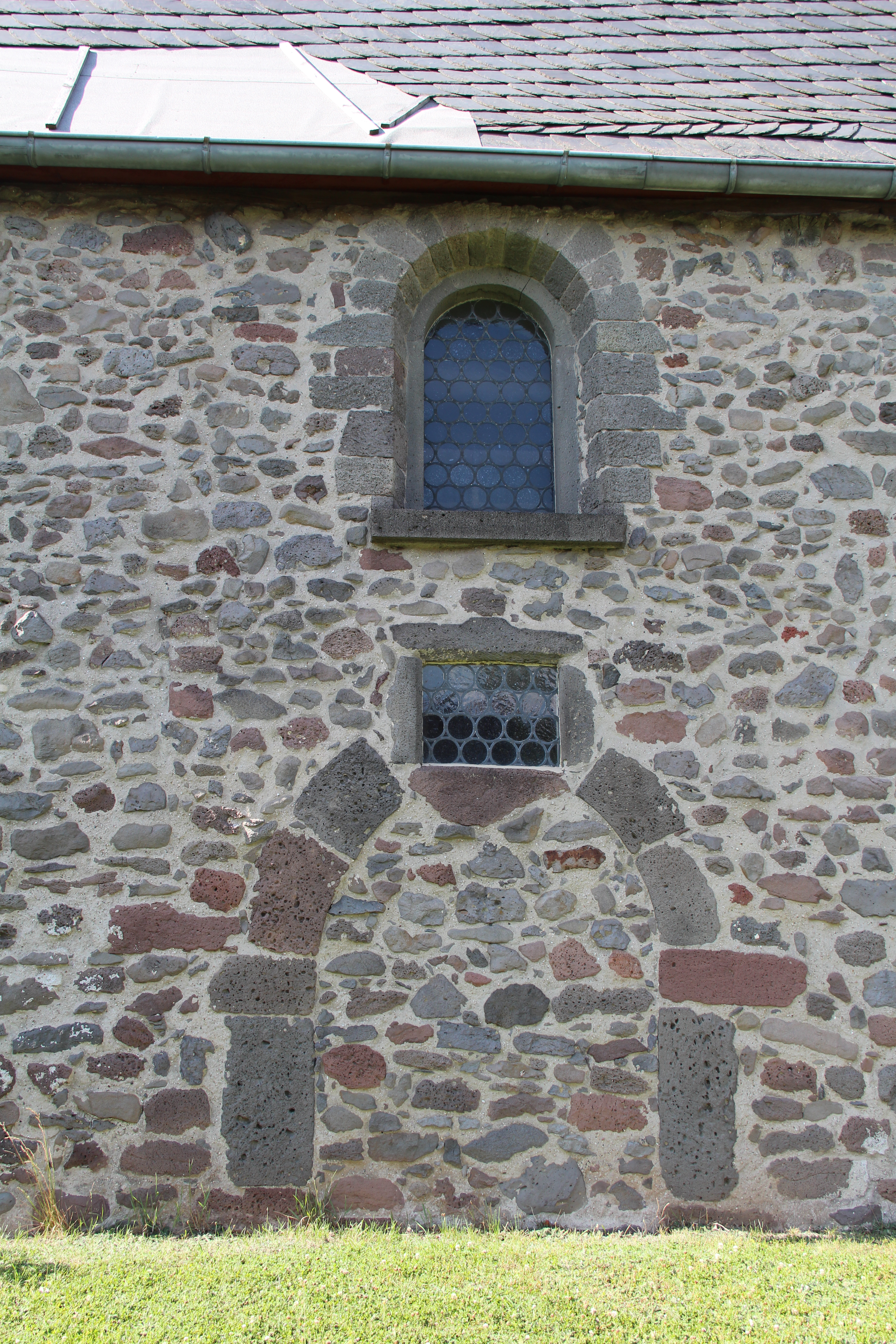 Südportal der Kirche von Odenhausen (Lumda), Kreis Gießen, Hessen, Deutschland